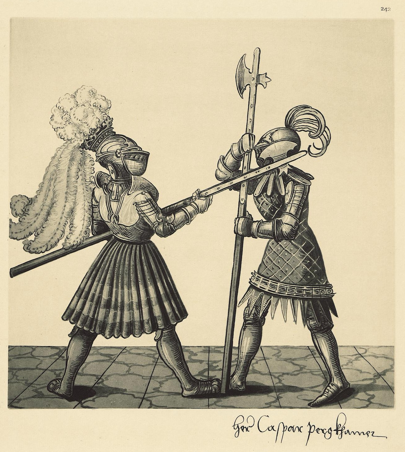 Tafel aus: Freydal: des Kaisers Maximilian I. Turniere und Mummereien; mit einer geschichtl. Einleitung. Tafeln. Wien, 1882. Exemplar der UB Tübingen. (Faksimileedition des Turnierbuchs Freydal, Kunsthistorisches Museum Wien, Signatur: K.K. 5073) Tafel 242 Herr Caspar Perkhaimer